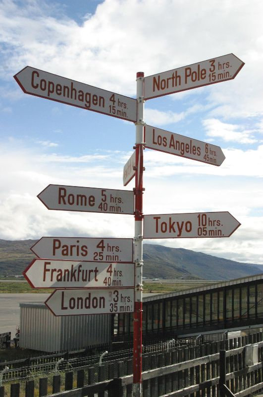 Artig skilt i Kangerlussuaq, Grønland / Funny sign in Kangerlussuaq, Greenland